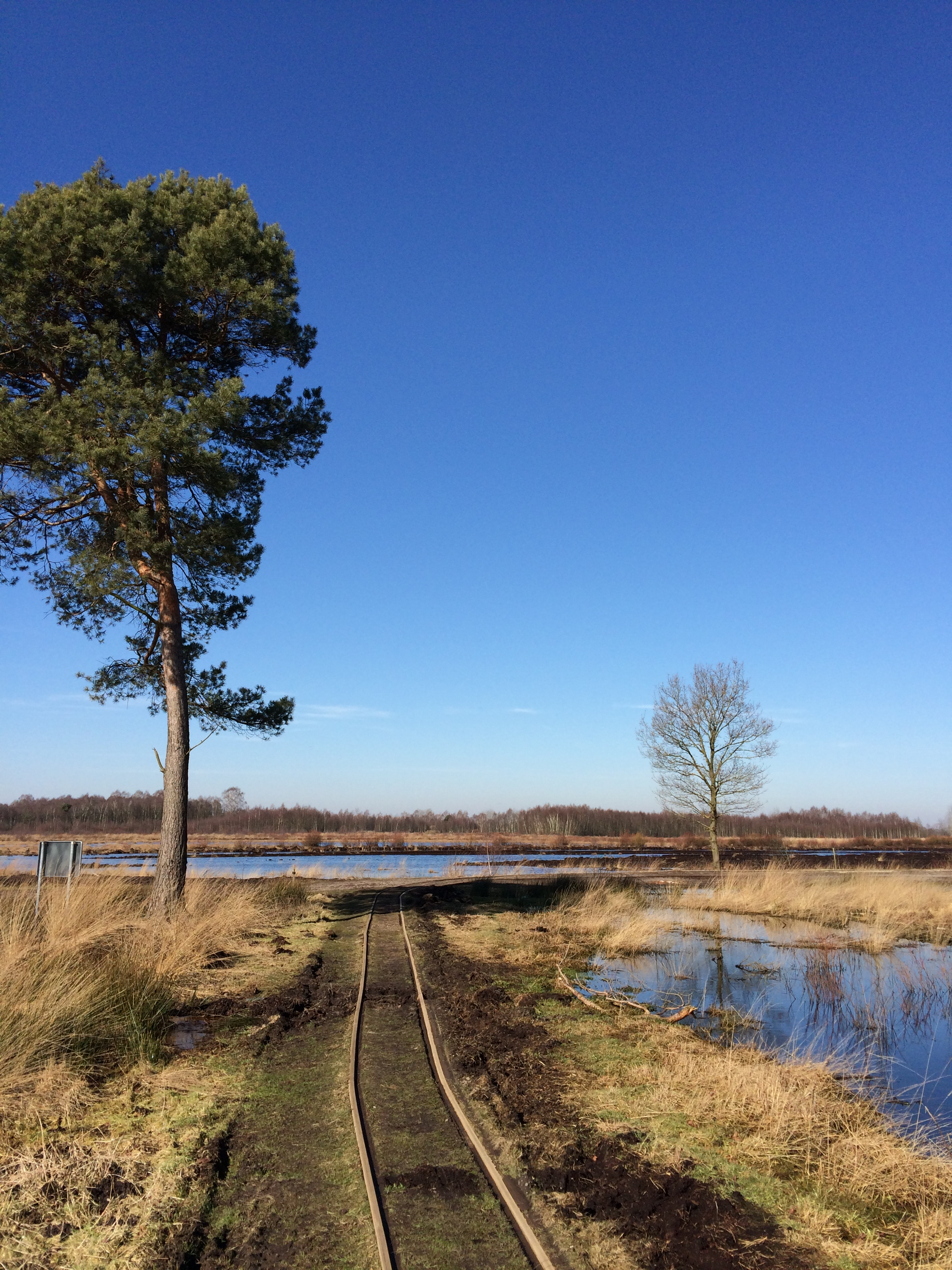 NSG-Nr. WE 180 im Landkreis Vechta